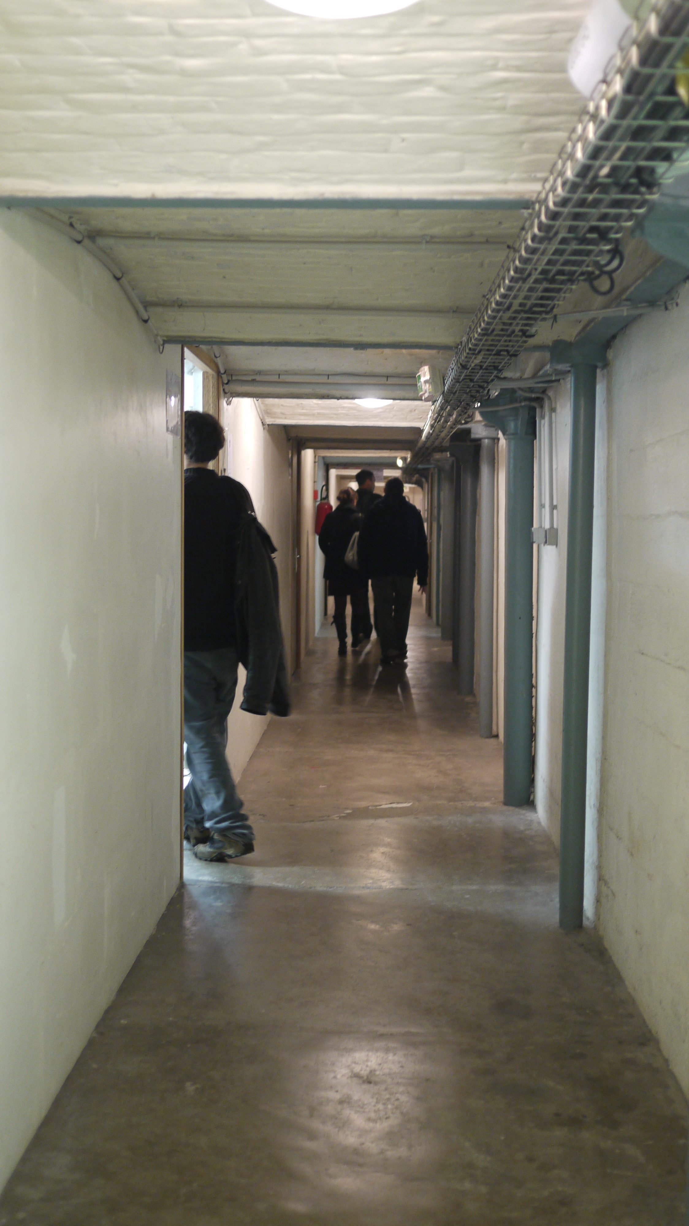 Vue de l'un des étages de la malterie : un plateau de 300 m² occupé par 7 ateliers d'artistes desservis par un long couloir.